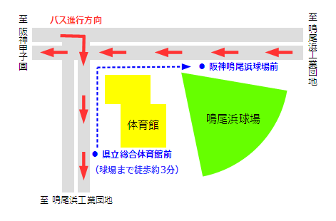 鳴尾浜球場付近バス停地図